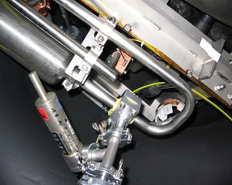 Nachweis der integralen Dichtheit mit dem integralen Vakuumverfahren B2.1 der DIN EN 1779